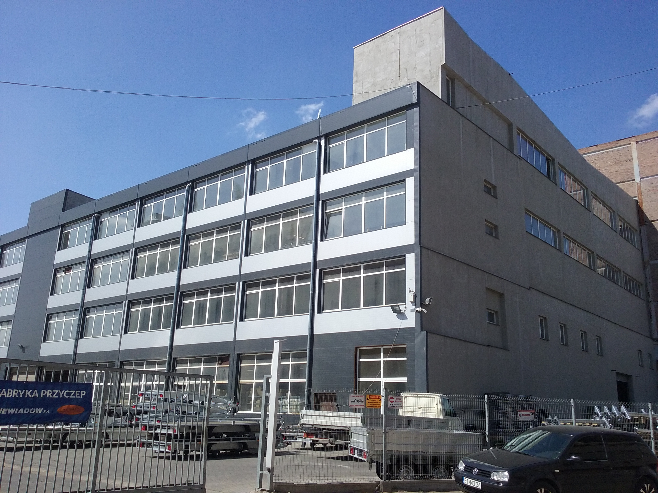 Tomaszów Mazowiecki w województwie łódzkim, PL,EU. Fabryka przyczep Niewiadów na terenie dawnego Wistomu (TFSJ), w Tomaszowie. CC0